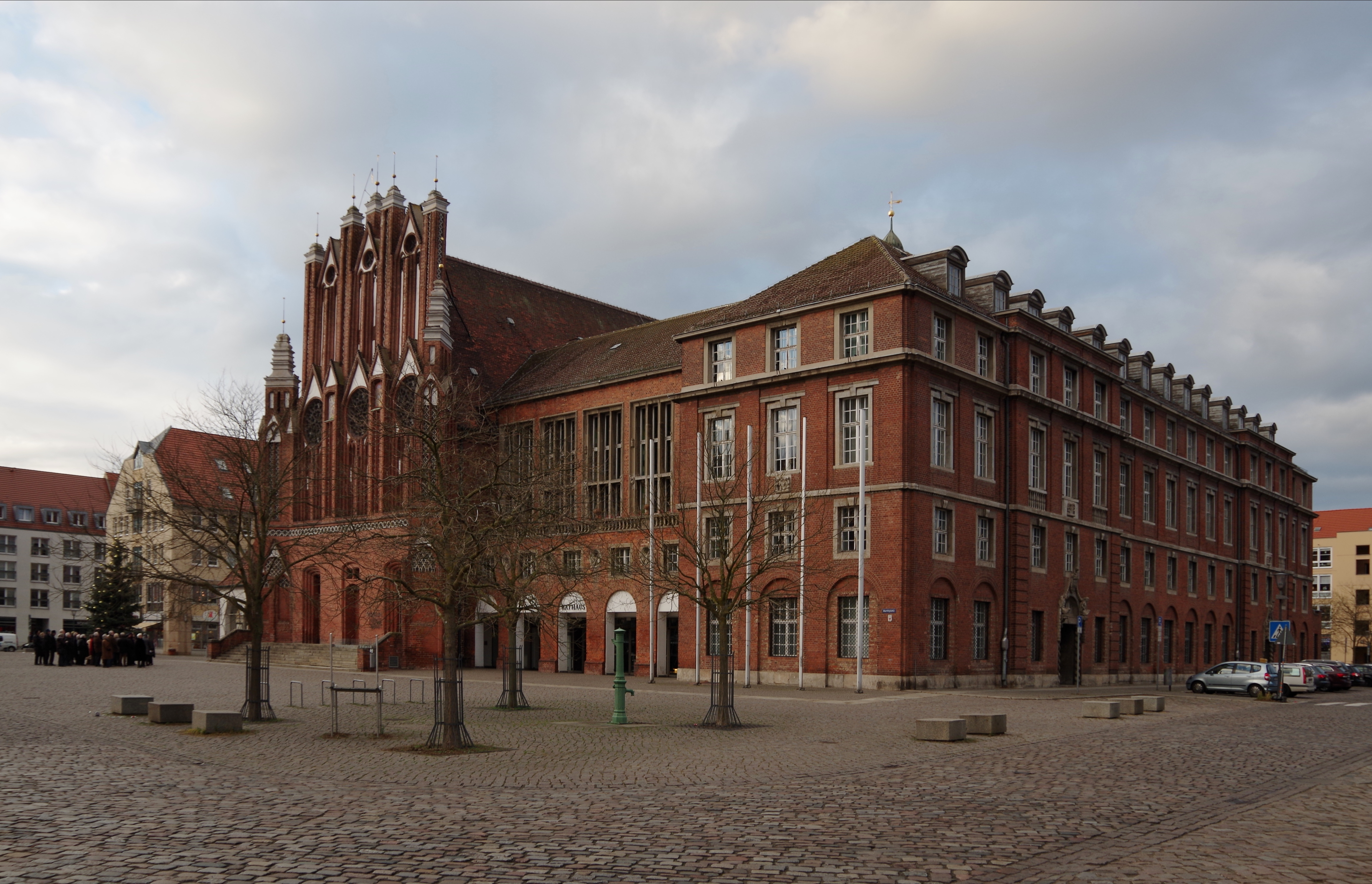 Rathaus in Frankfurt an der Oder; Marktplatz 1, 2. Anbau unter Leitung von Karl Otto Schwatlo